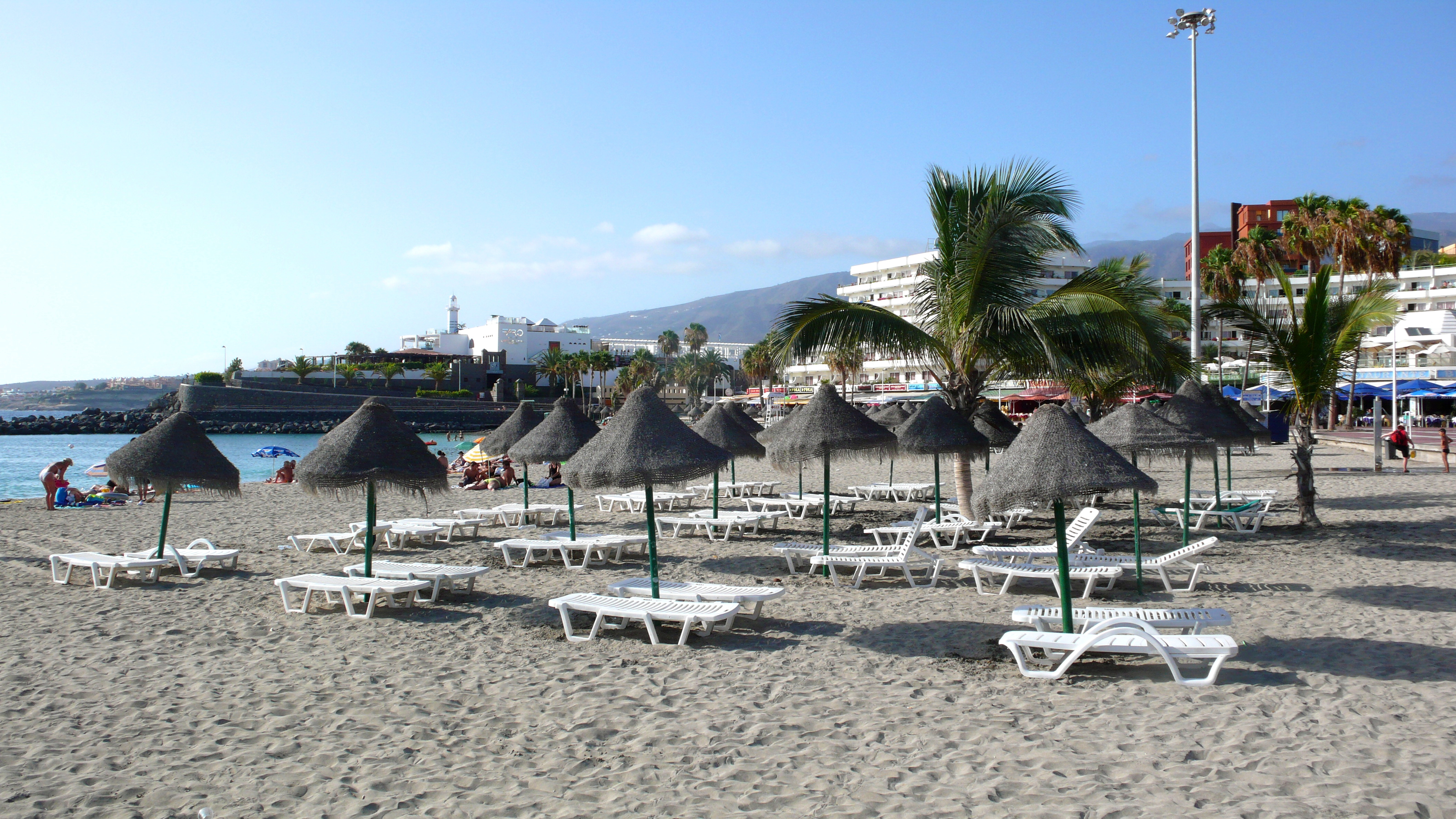 Playa de Torviscas, Adeje (Tenerife)